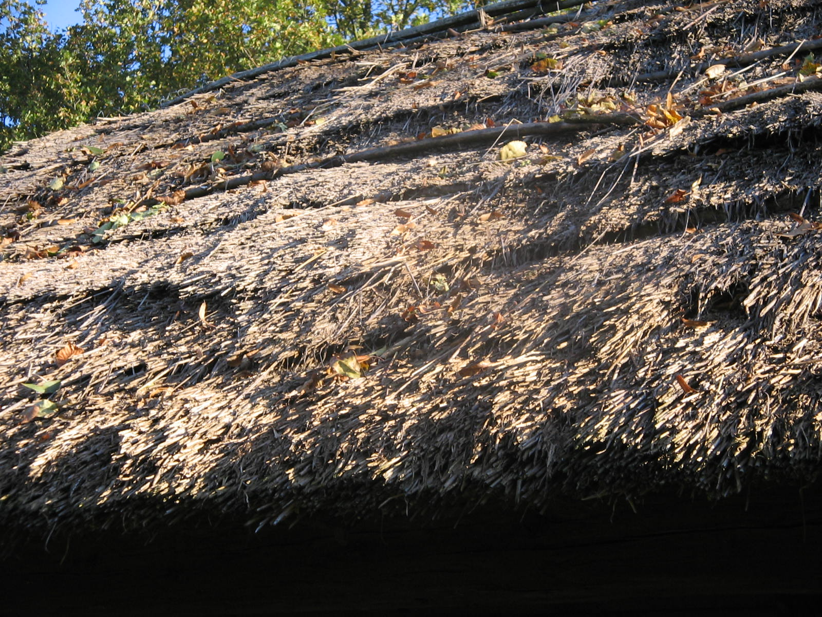 Open air museum Zaprice, Quelle: eigene Aufnahme 18. 10. 2005 Fotograf: Janez Novak, Ljubljana, Slovenija